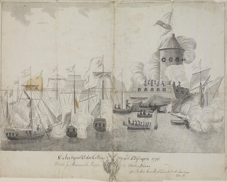 Invigning av Coldinuordens fästning Nya Chartago på Lilla Essingen 1786 "Debarquement des Collins au L'il d'Essingen 1786. Dediée à Monsieur la Major de Wallenstierna par son très humble et très obeissant Serviteur C. W: v. K. "